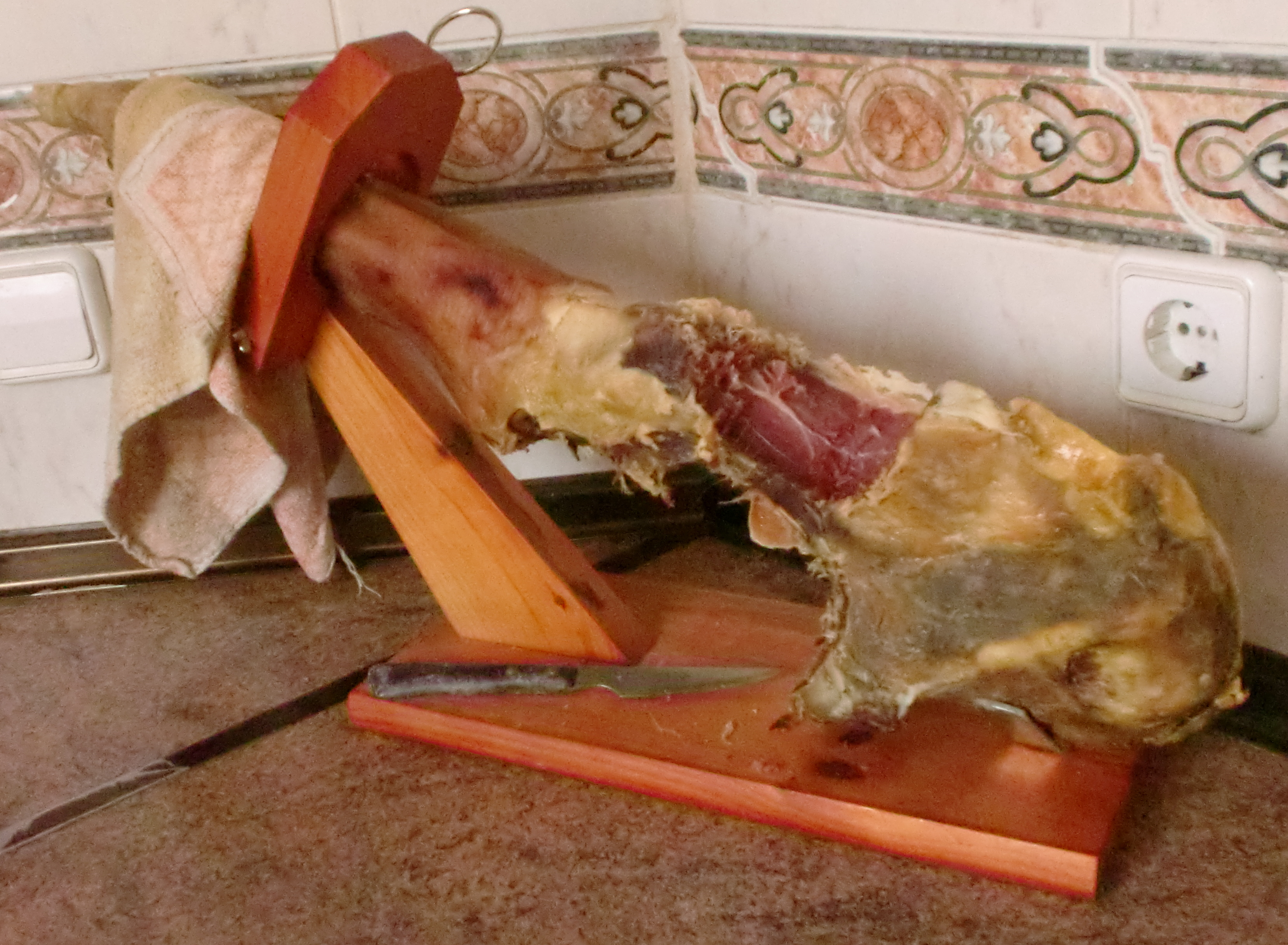 Jamón común y corriente, cortado por un aficionado